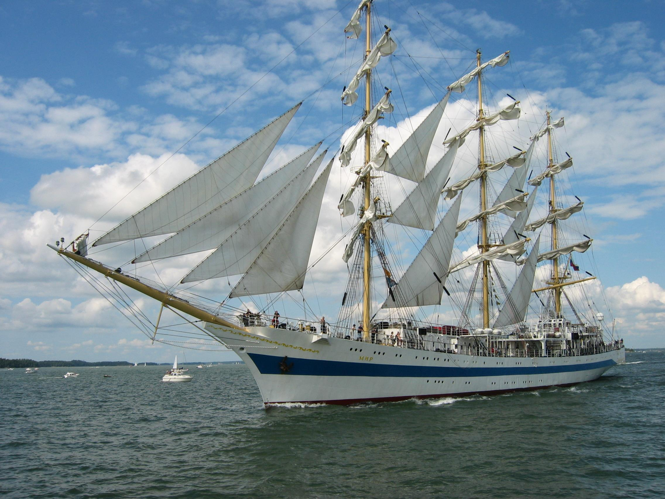 "Mir" sailing from Turku.